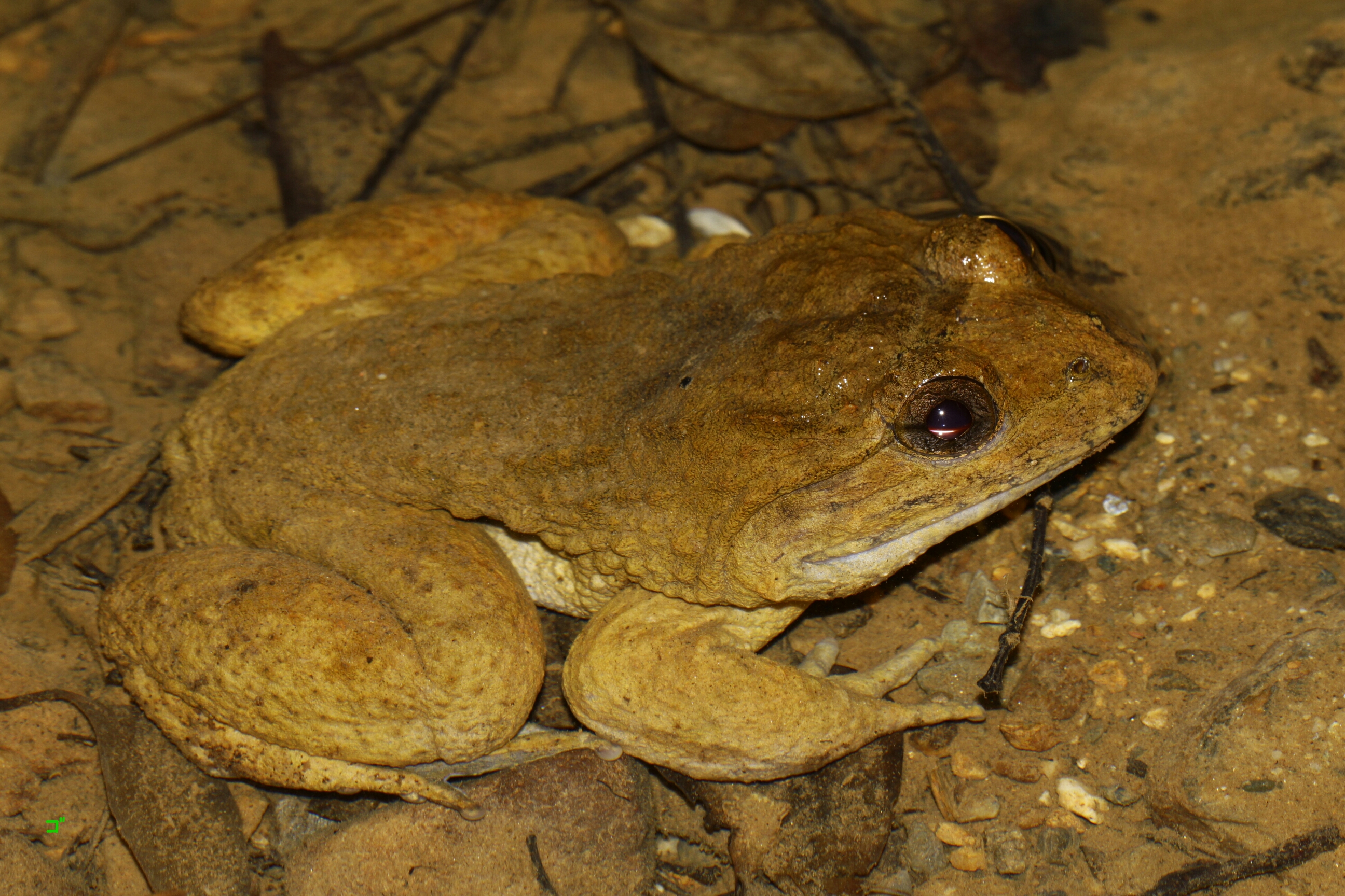 カエル frog